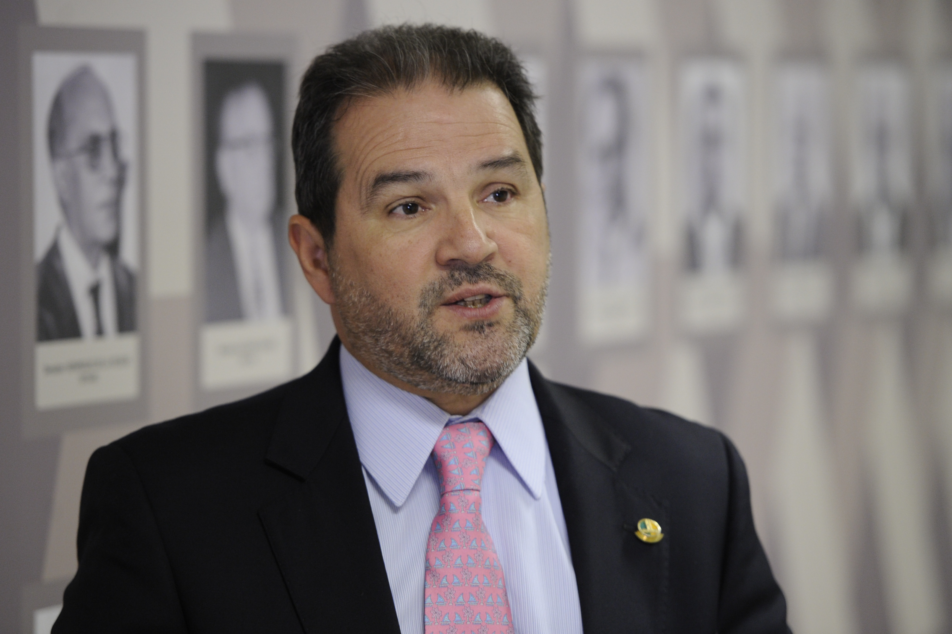 Senador Eduardo Lopes (PRB-RJ) concede entrevista. Foto: Edilson Rodrigues/Agência Senado